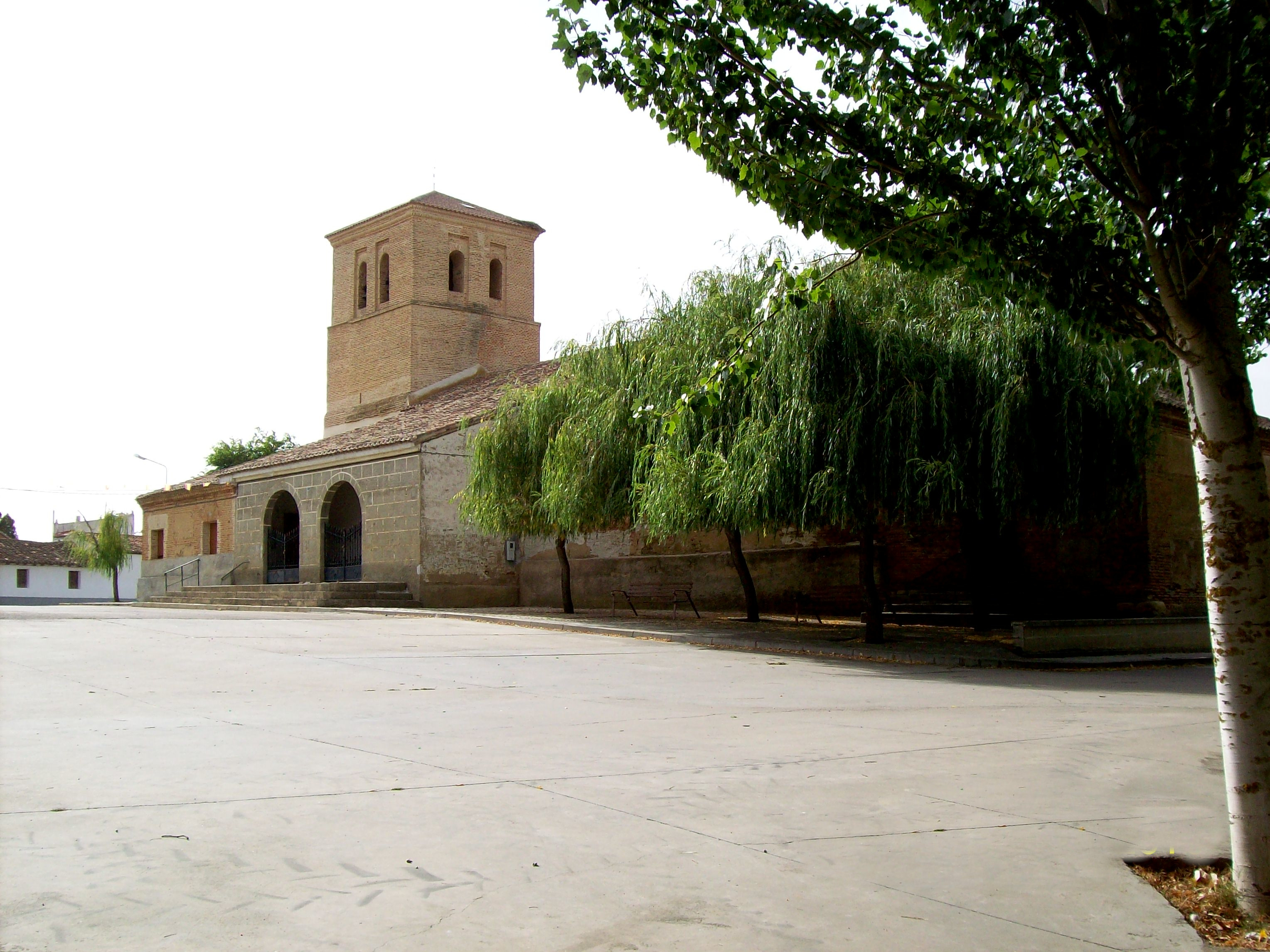 Iglesia parroquial de Satiago Apóstol en Calzada de los Molinos, Palencia, España.